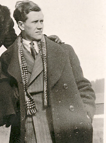 Suomalainen näyttelijä, ohjaaja, käsikirjoittaja ja teatterinjohtaja Hannes Häyrinen (1914-1991) vuonna 1939. Rajattu alkuperäisestä valokuvasta.